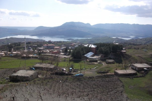 Gerger, Adıyaman'dan bir görünüm